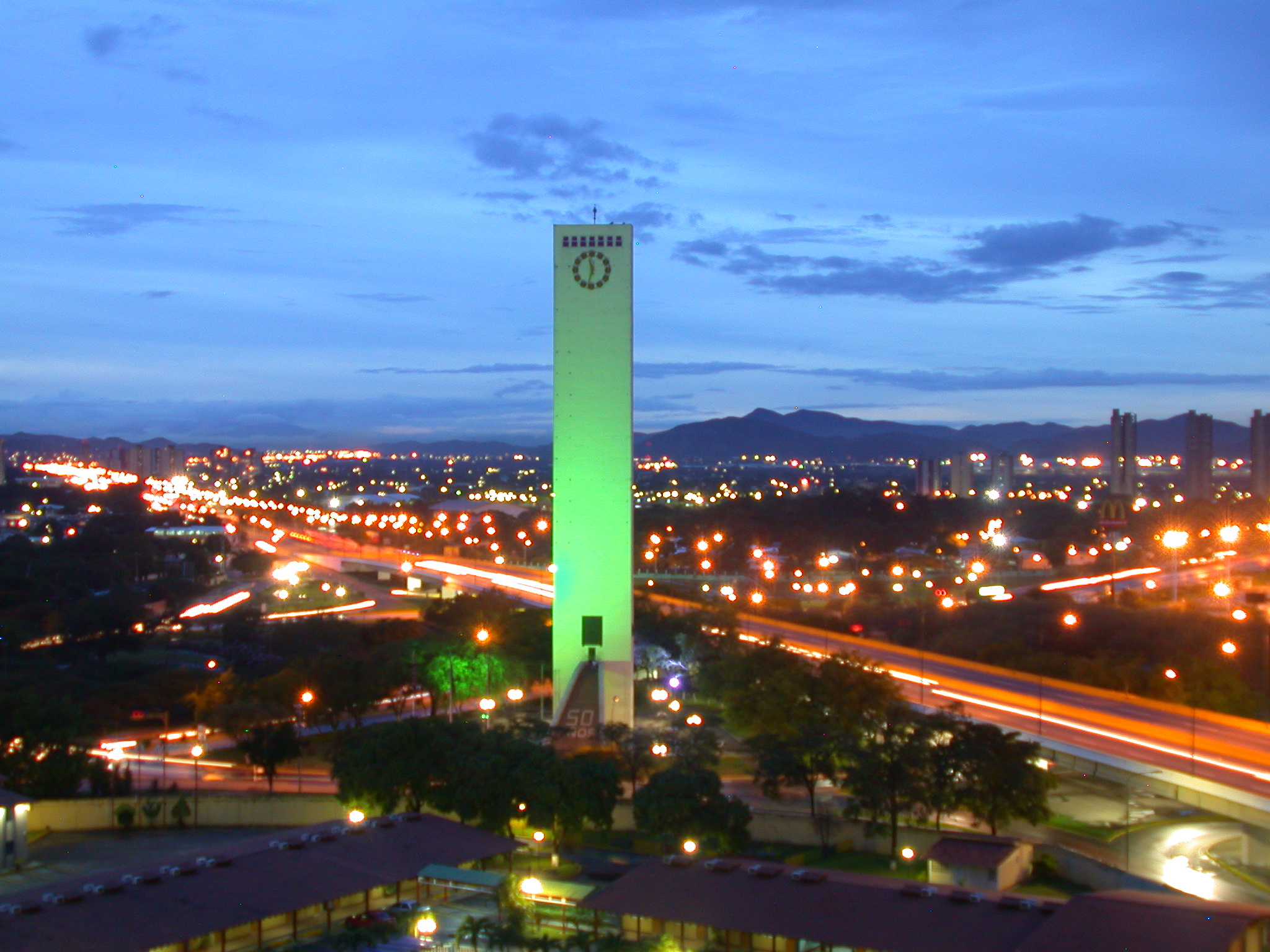 Obelisco de Barquisimeto, año 2005